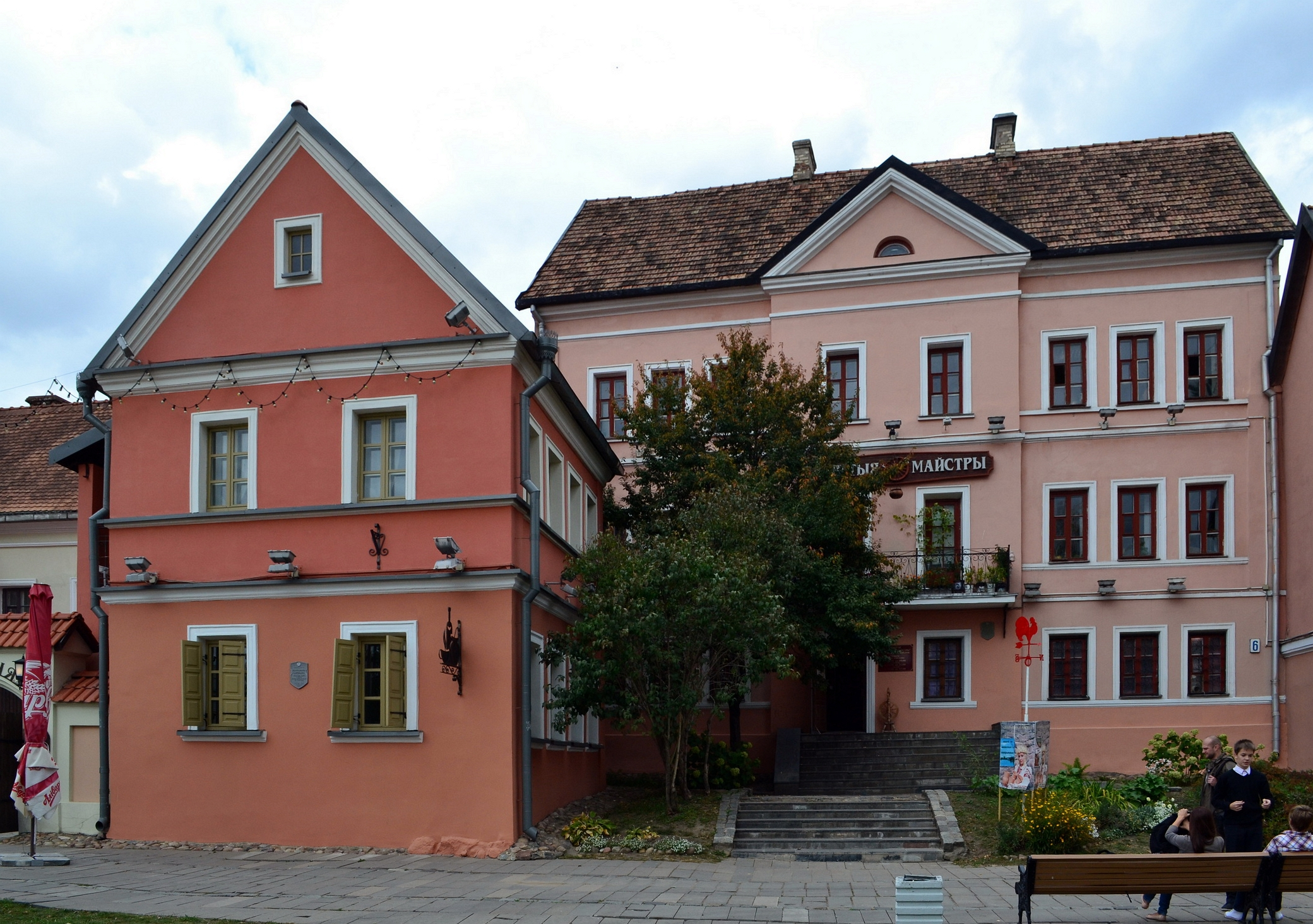 Беларуская (тарашкевіца): Гістарычны цэнтар Менску: цацачныя хаткі ў Траецкім прадмесьці This is a photo of Belarusian heritage monument. Reference number: 711Е000001 ( WLM)